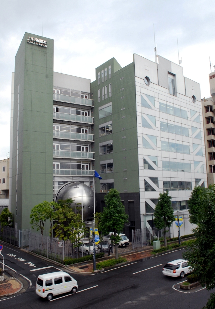 上毛新聞社の社屋です。2007年9月に撮影。